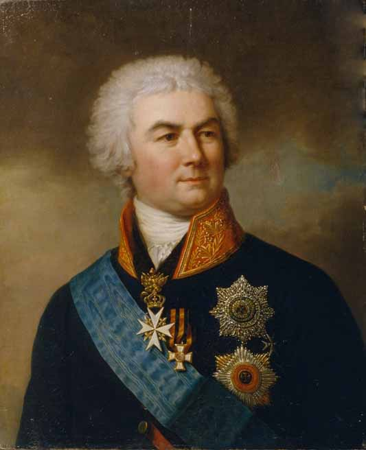 Петр Васильевич Завадовский (1739-1812), Министр народного просвещения Российской империи.